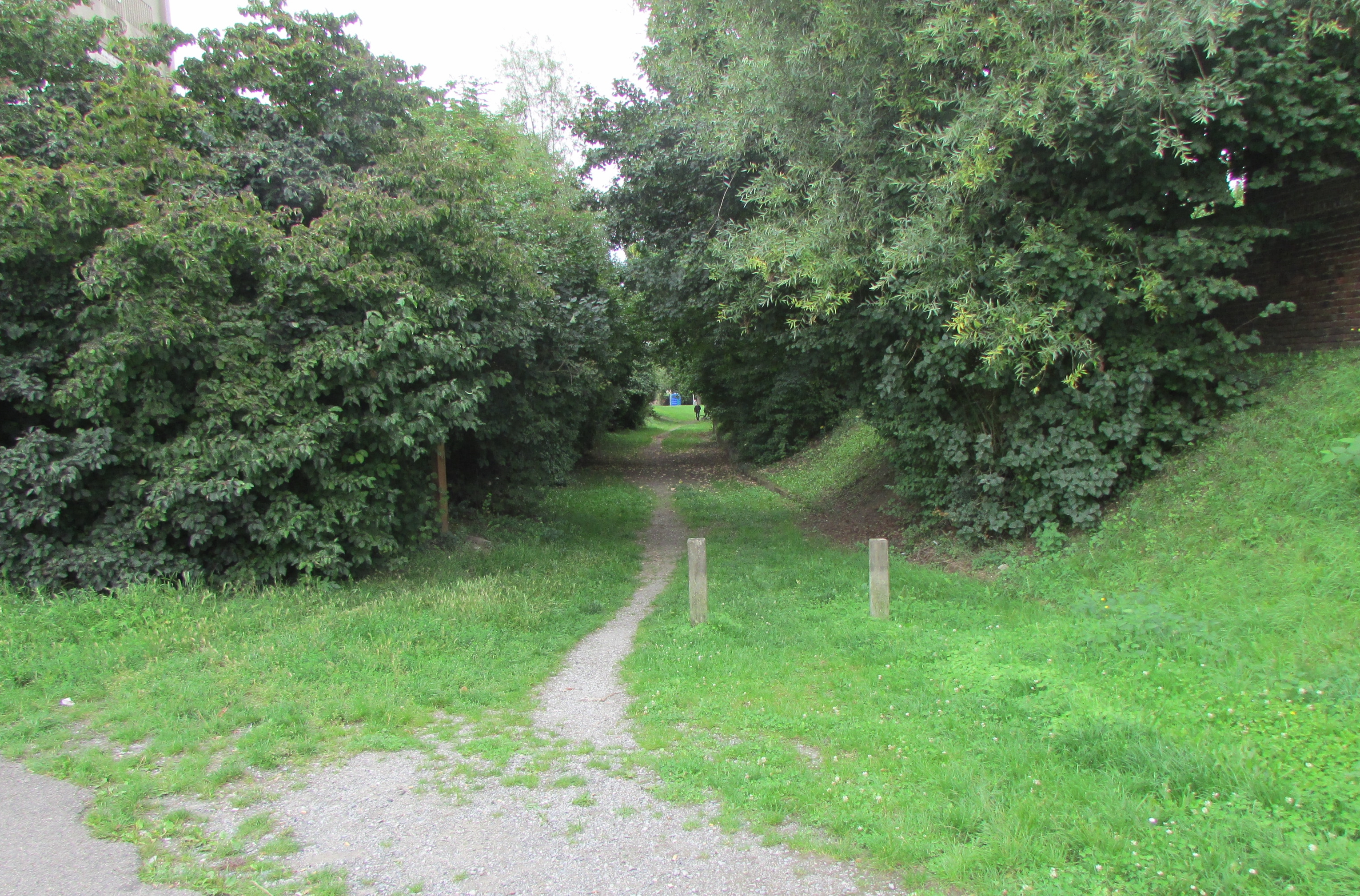 Tracé de l'ancienne voie ferrée du Vélu